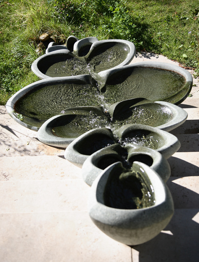 Flowform by John Wilkes Vortex Garten Darmstadt